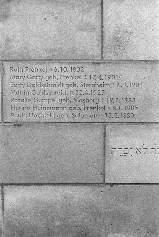 Namensnennung von Berty Goldschmidt, Tochter Adolf Sternheims, und deren Sohn Martin Goldschmidt am Denkmal der Synagoge Lemgo